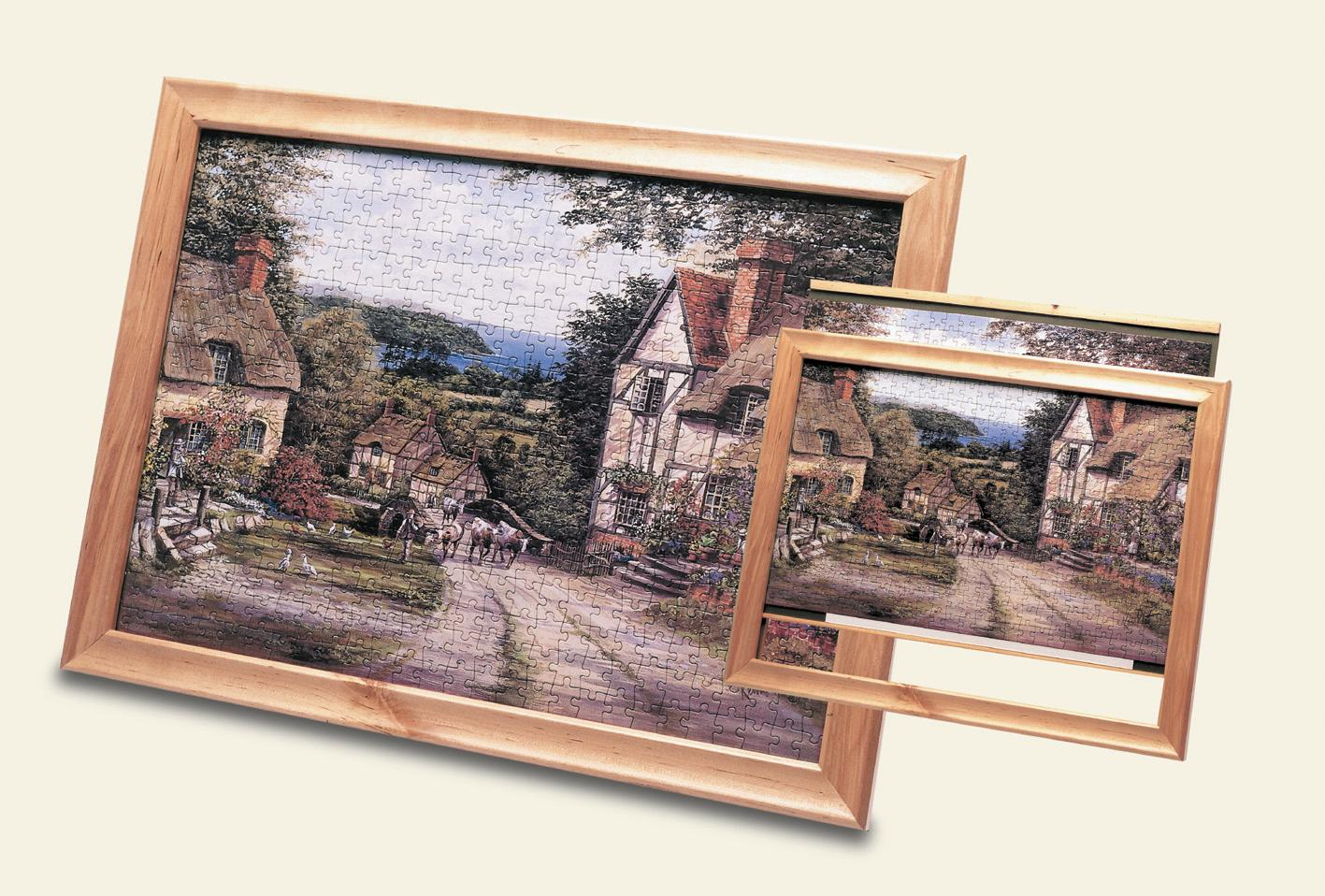 Jigframe